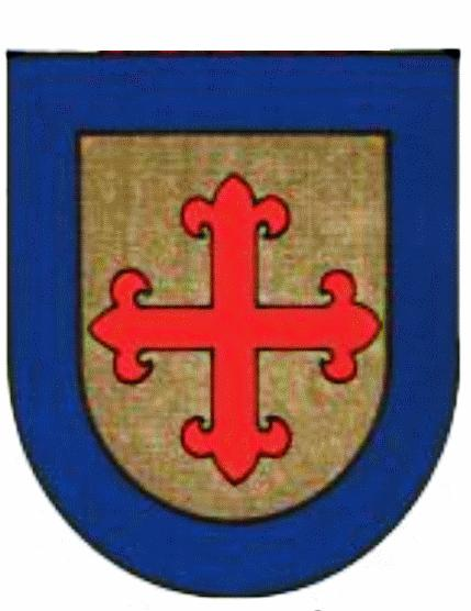 Brasão Antigo dos Resendes, dito falso brasão. O verdadeiro é igual ao da família de Baião, da qual o apelido Resende proveio.